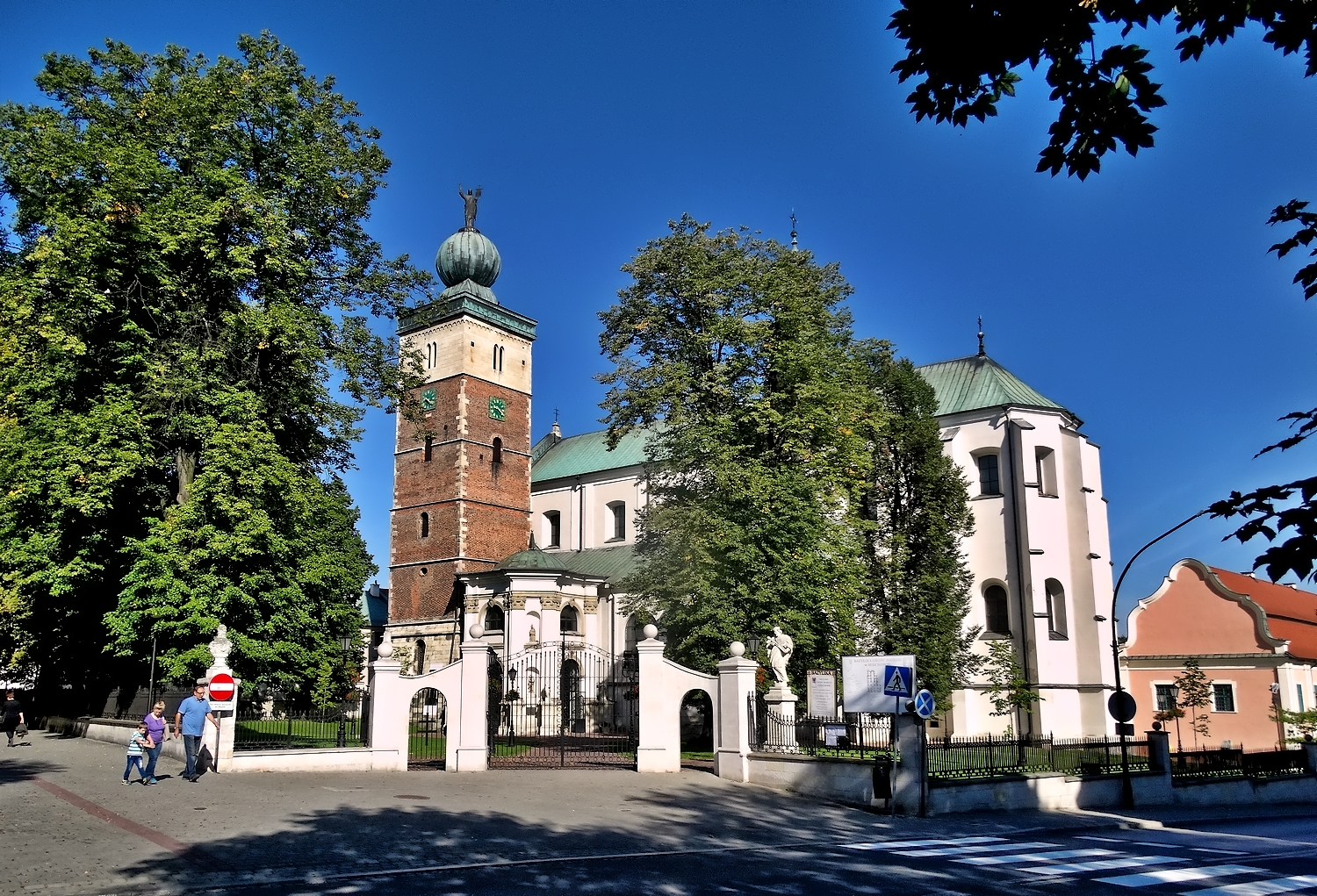 Bazylika pw. Grobu Bożego